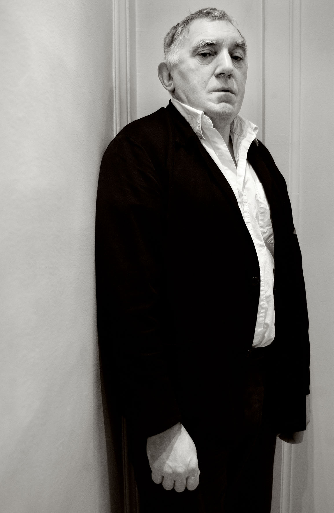 Jan Decleir, Vlaams acteur en kunstschilder.